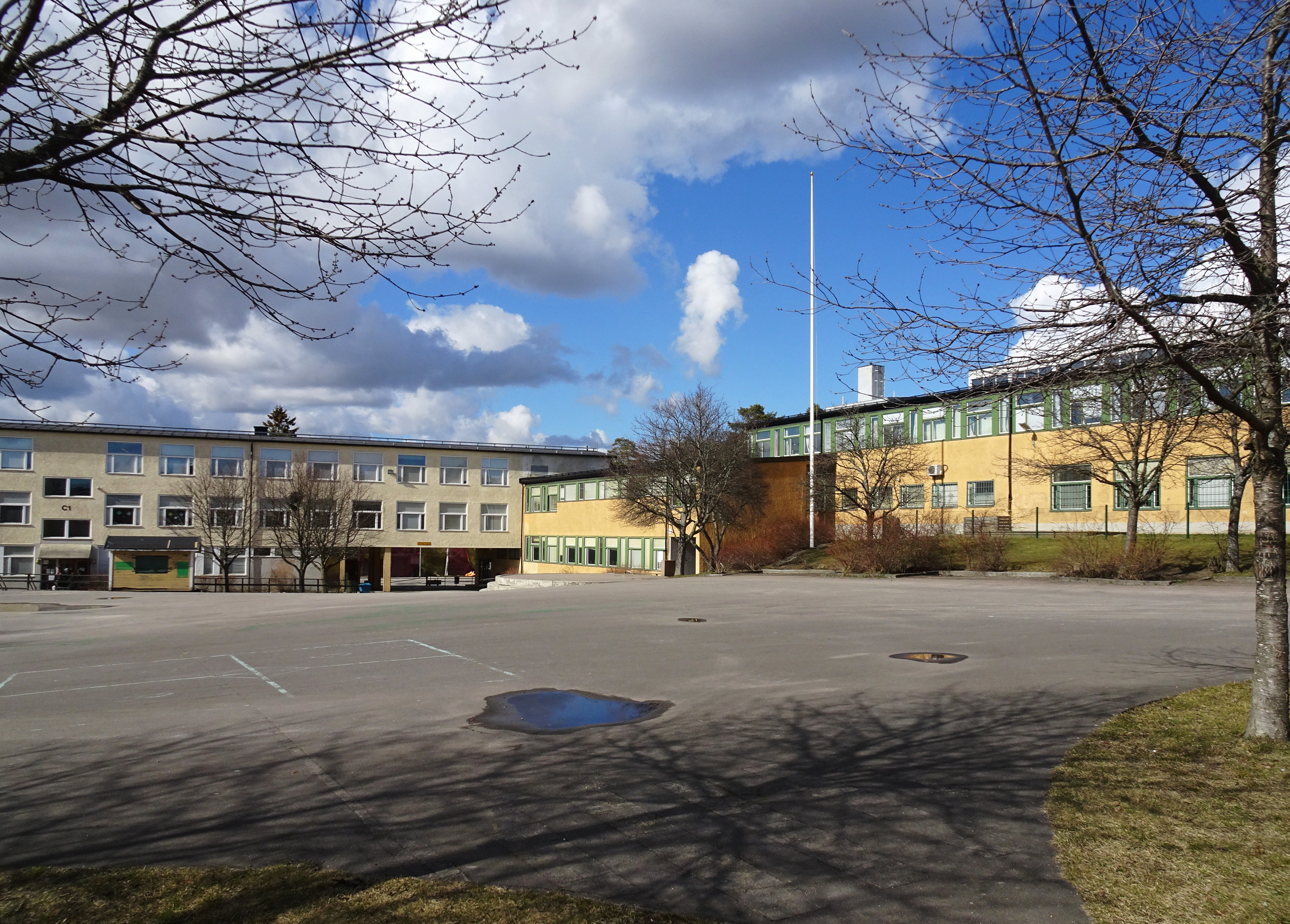 Bergholmsskolan, Bergsrådsvägen 3, färdig 1959 (arkitekt var Gustaf Kaunitz)